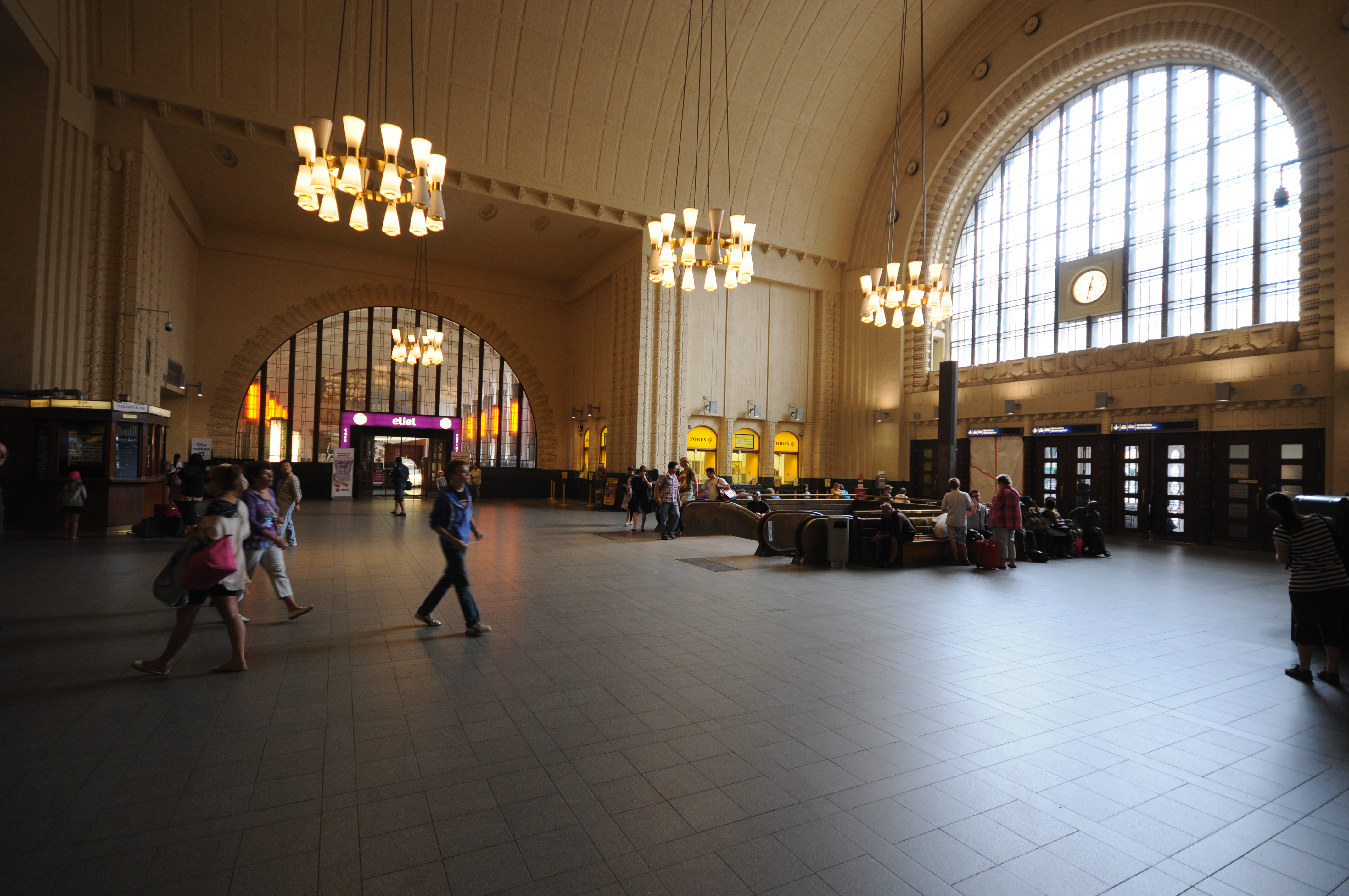 Helsinki